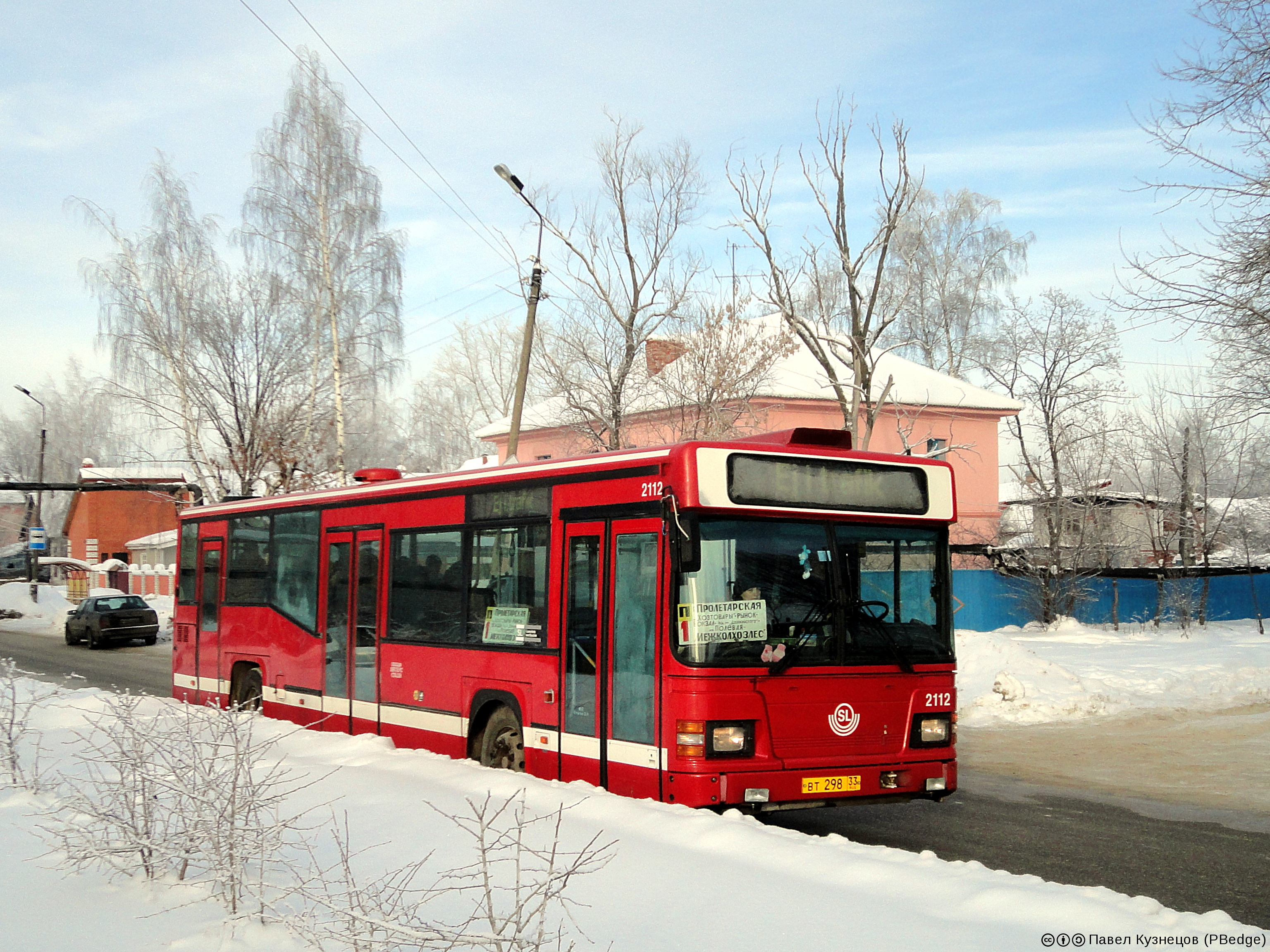 Scania MaxCi госномер ВТ 298 33 на маршруте № 1 «П». Гусь-Хрустальный, Красноармейская улица.